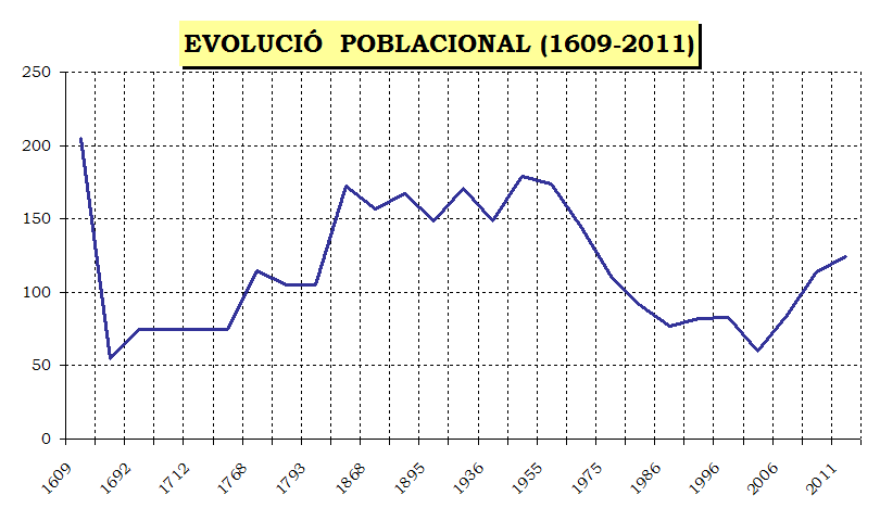 Población de Annauir (1609-2013).